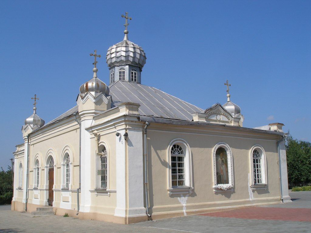 Церква святого Миколая, Запоріжжя, вул. Піщана